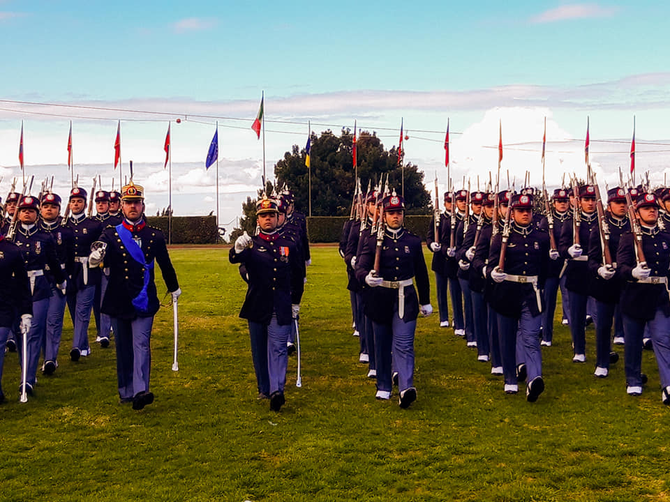 Dettaglio del giuramento del XXI Corso "Esempio" degli Allievi Marescialli dell'Esercito Italiano. Viterbo, 12 aprile 2019